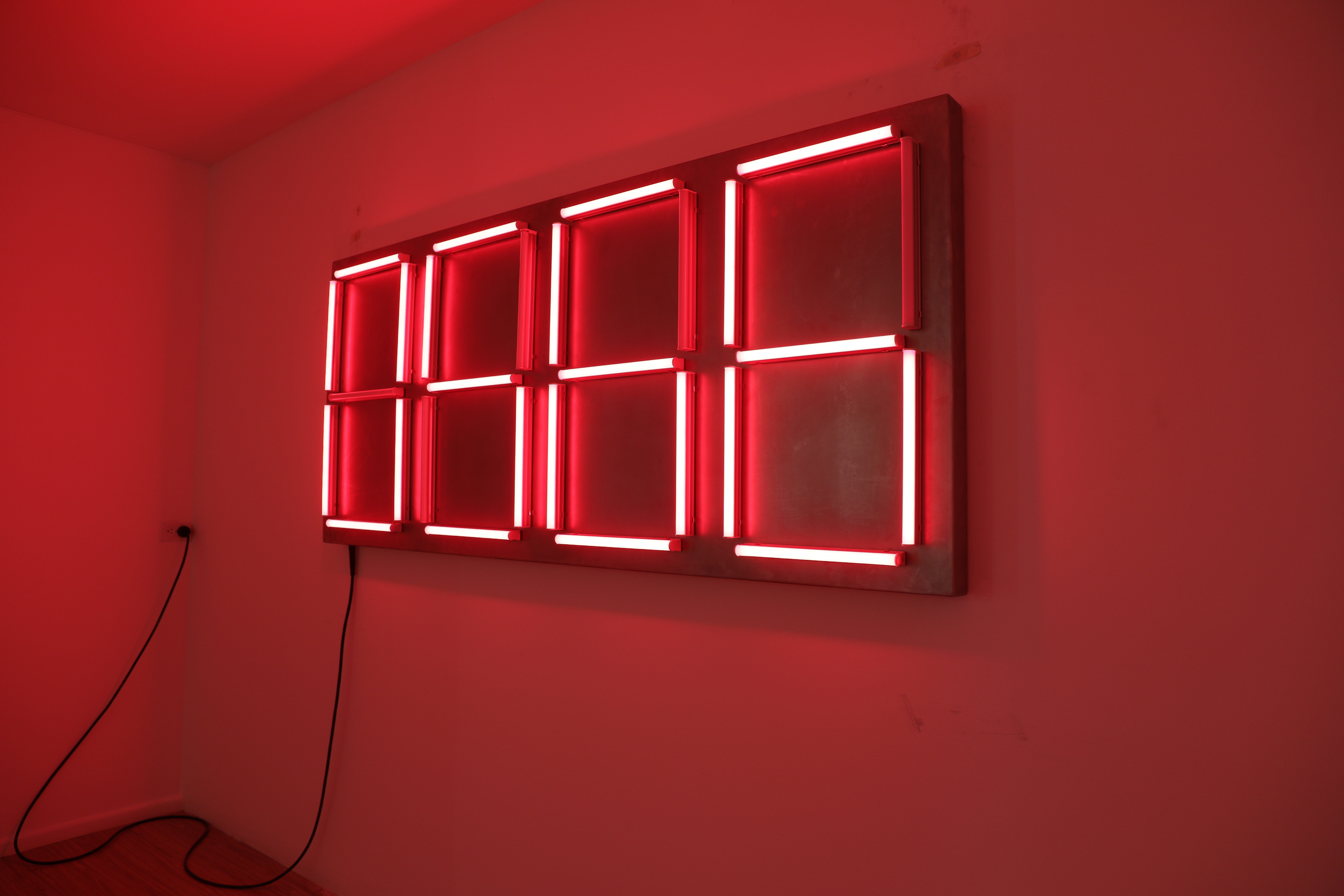 Derechos del artista Fernando Arias. Galería Foro.space